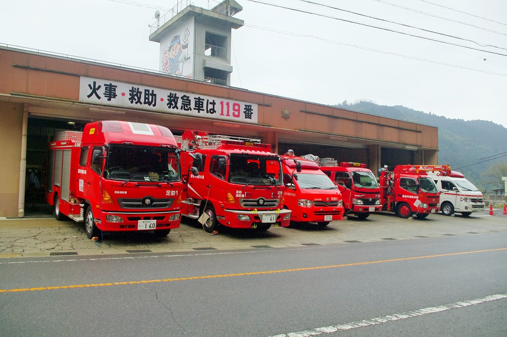 豊田市消防本部足助消防署